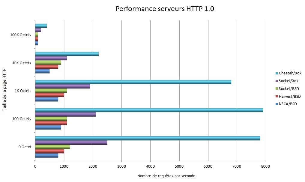 Perf-HTTP2